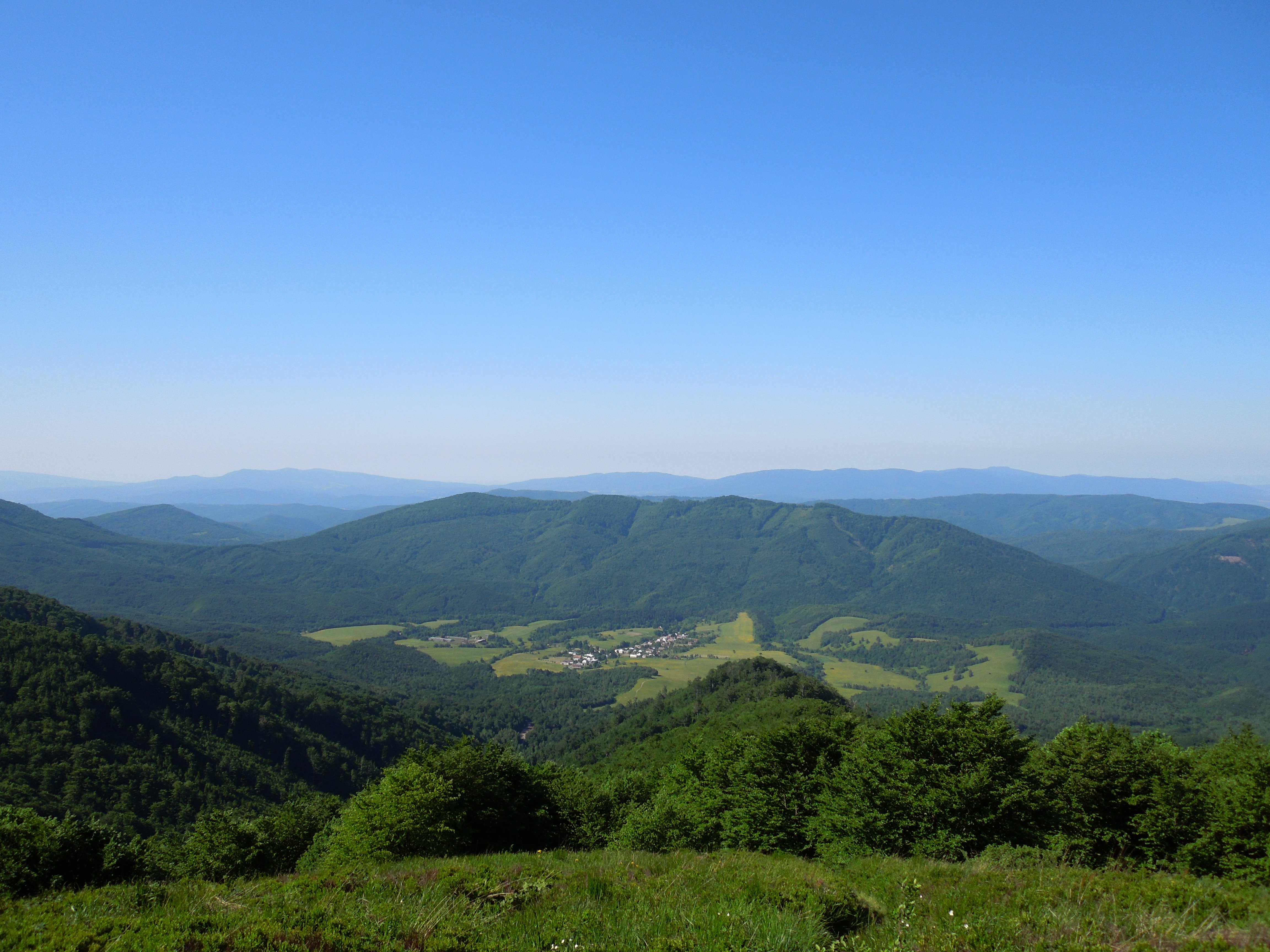 Pohľad do Runinskej kotliny s obcou Runina zo Sedla pod Ďurkovcom v júni